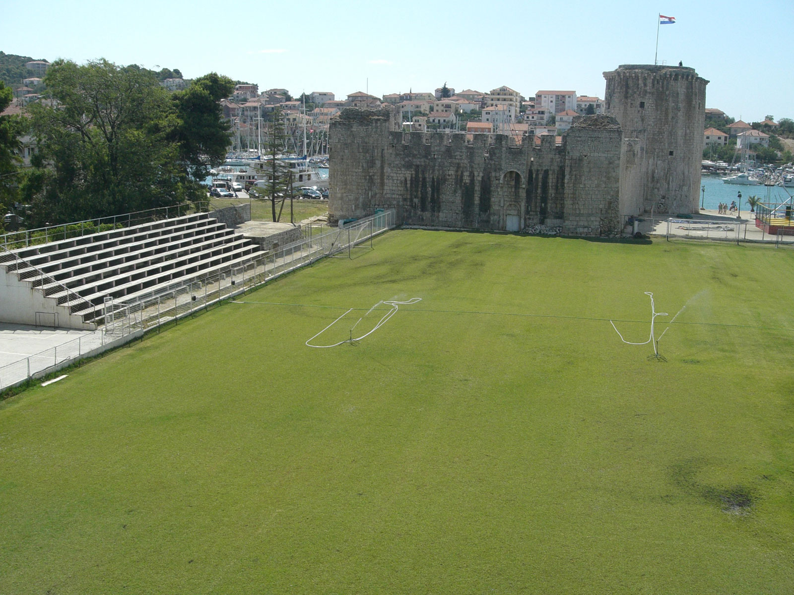 Trogir: Kula Kamerlengo i igralište Batarija